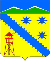 Герб станицы Чамлыкская Лабинского района Краснодарского края